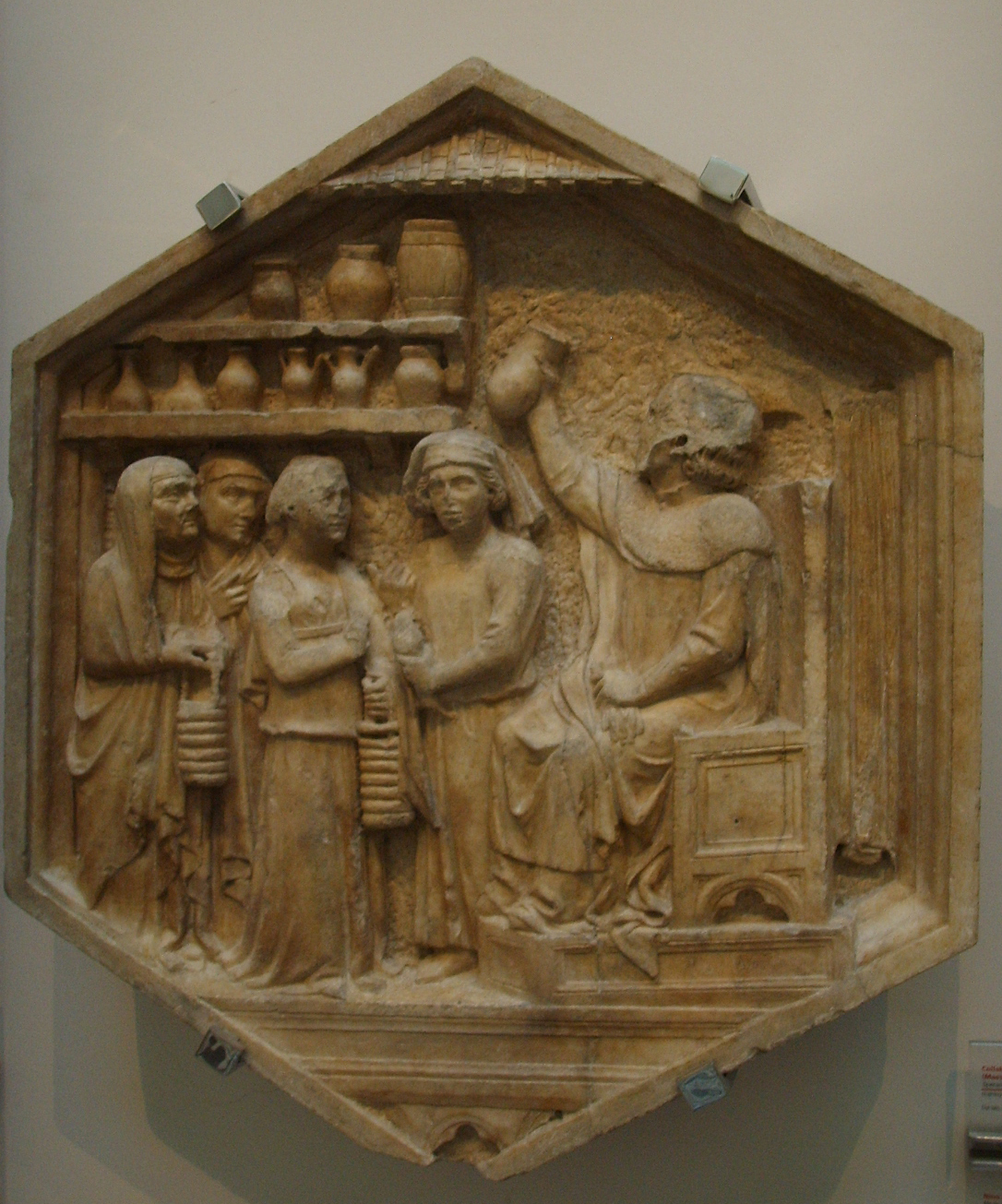 Formella 10, medicina, nino pisano, 1334-1336